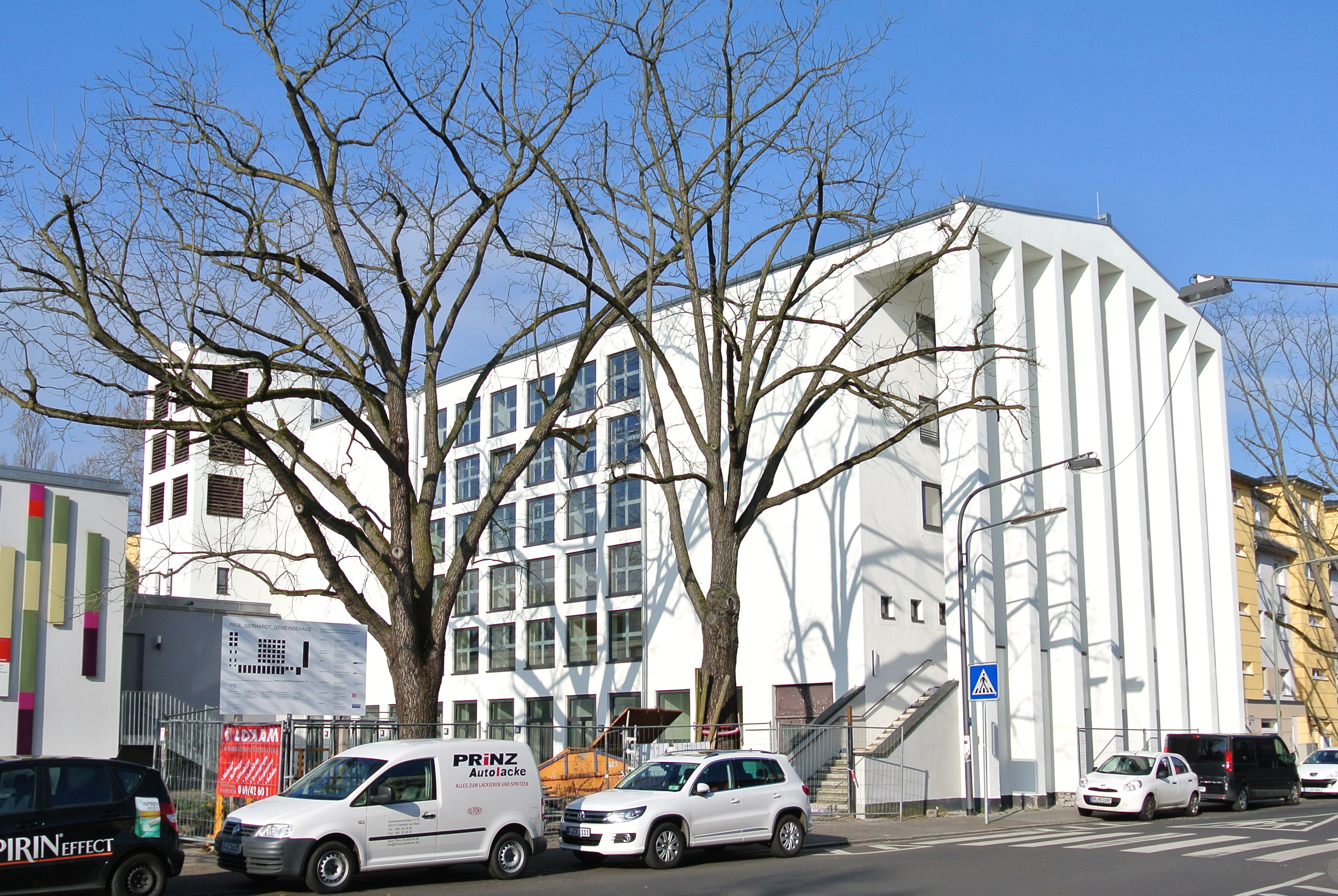 Das Gemeindezentrum mit Kirchsaal der ev.-luth. Paul-Gerhardt-Gemeinde in Frankfurt-Niederrad, Gerauer Straße 52; Baujahre 1929-1930; Architekt: Gottlob Schaupp